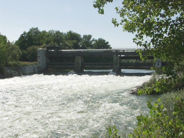 Traunwehr an der Stadtgrenze von Ansfelden und Linz am oberösterreichischen Fluss Traun